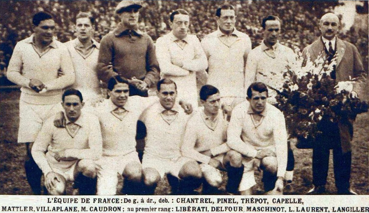 L'équipe de France de football à la Coupe du monde 1930 (face à l'Argentine).